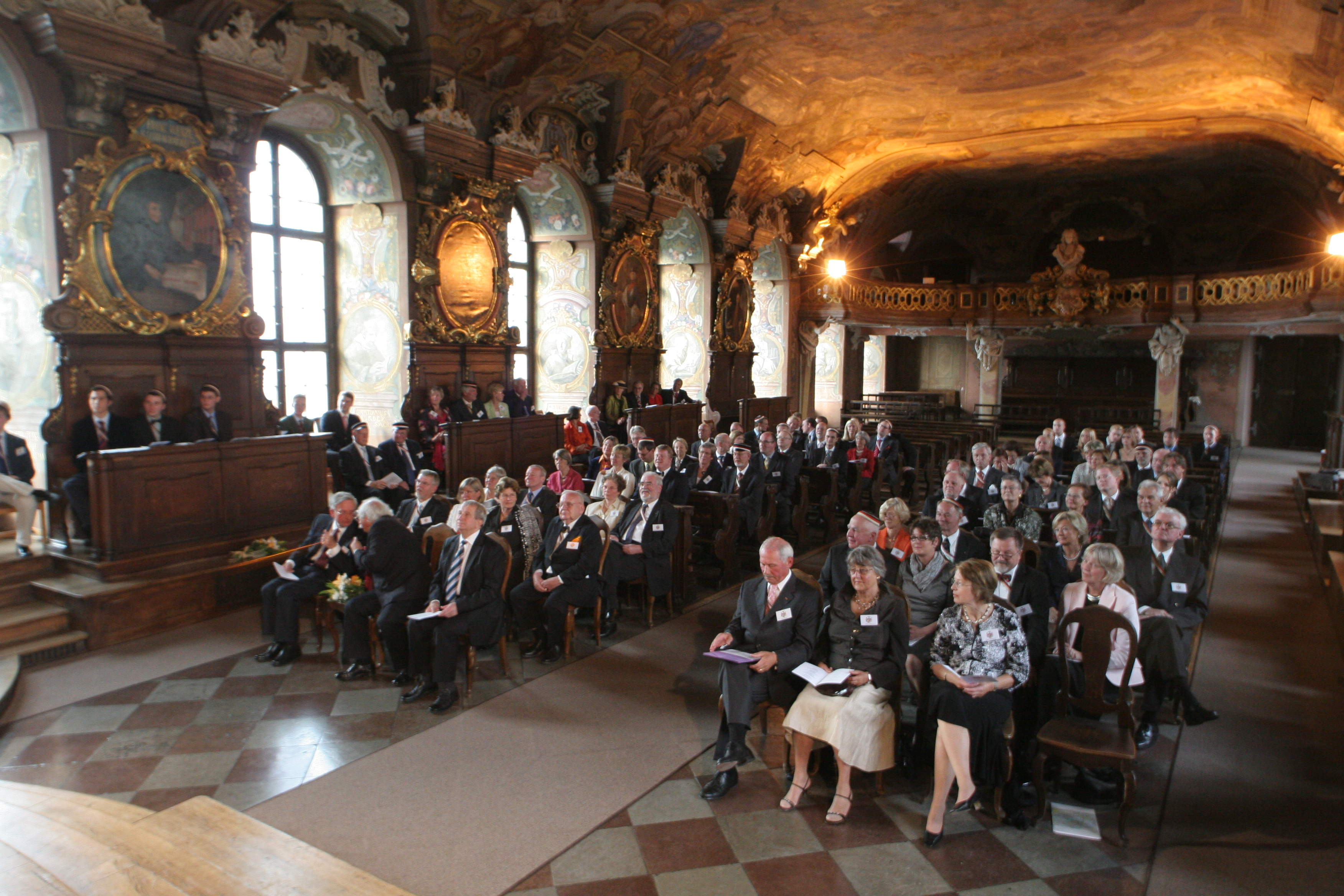 Leopoldina